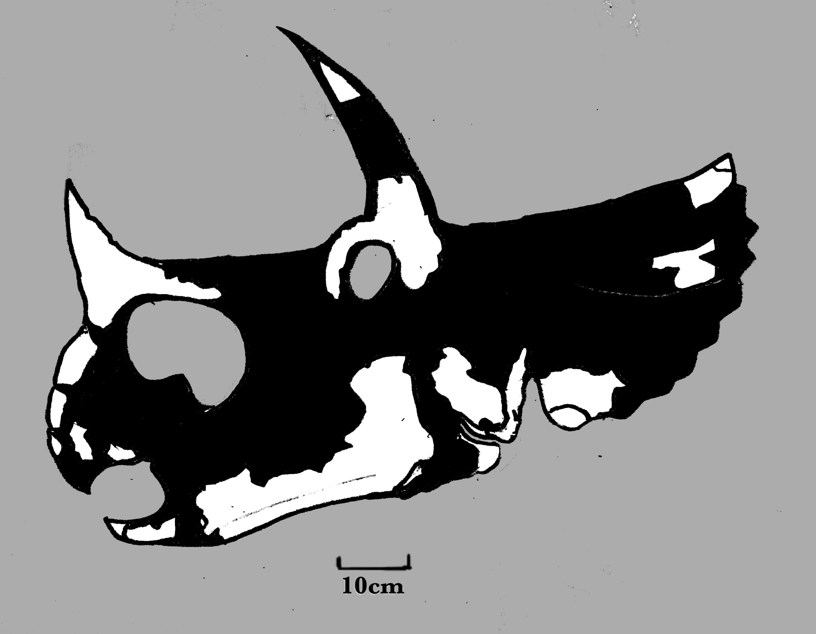 BHI 6226 に基づく復元頭骨の図。